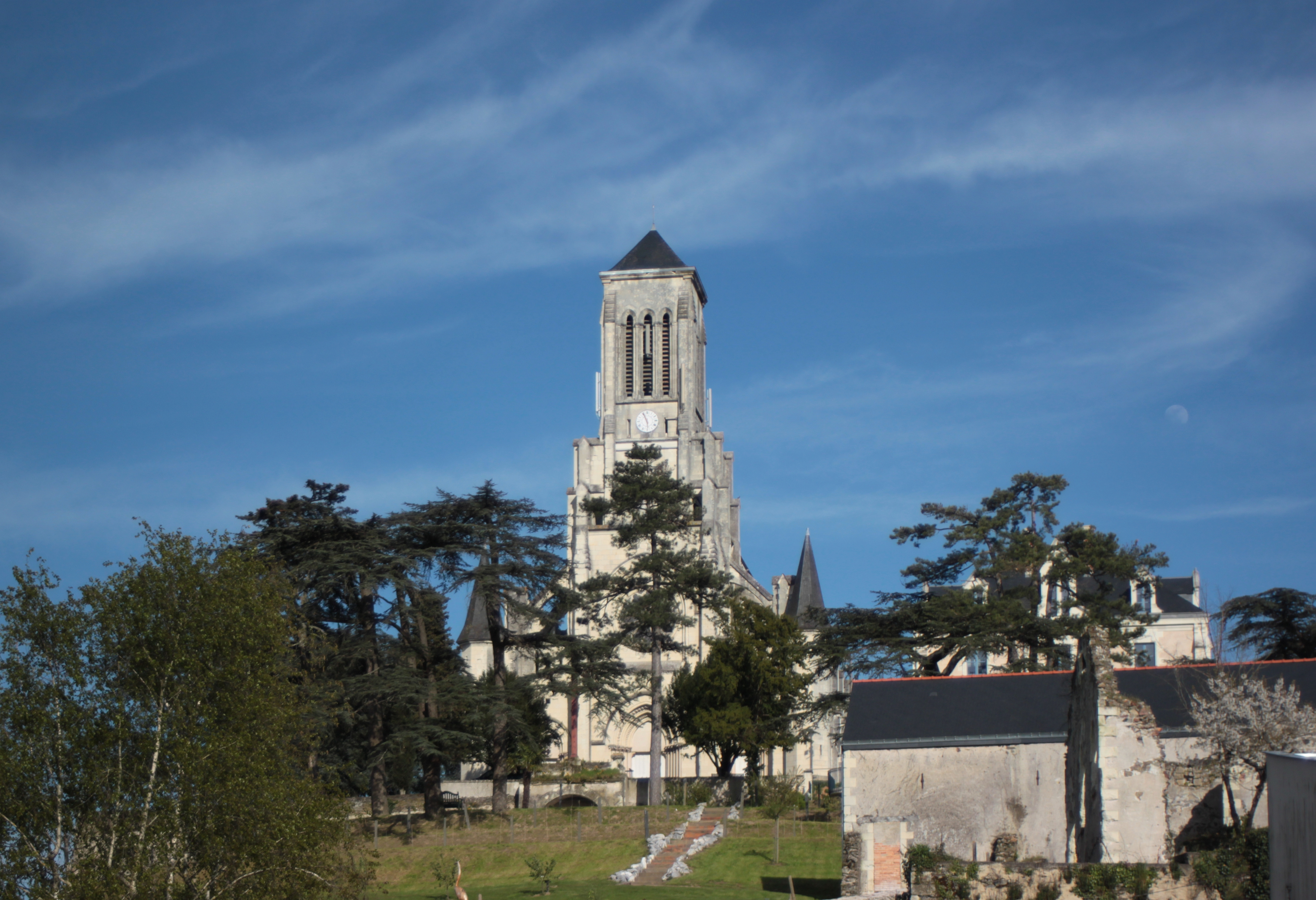 Église Saint-Syphorien, XIX°, Fr-17-Moëze.